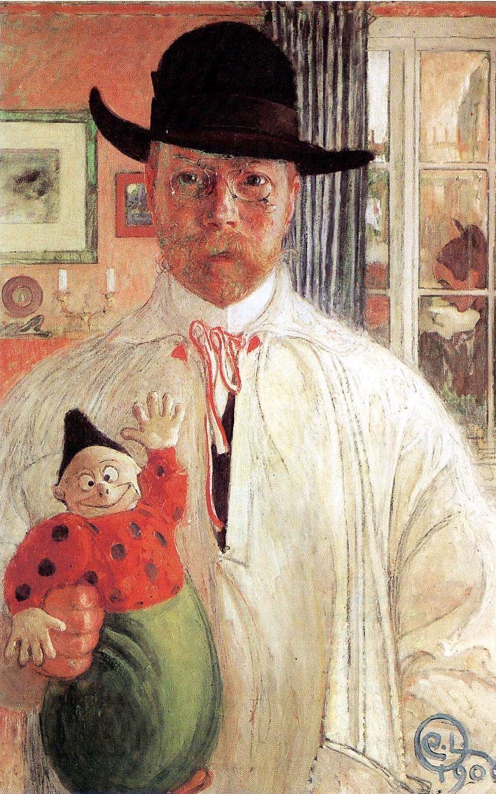 Selbstproträt des schwedischen Malers Carl Larsson († 1919)